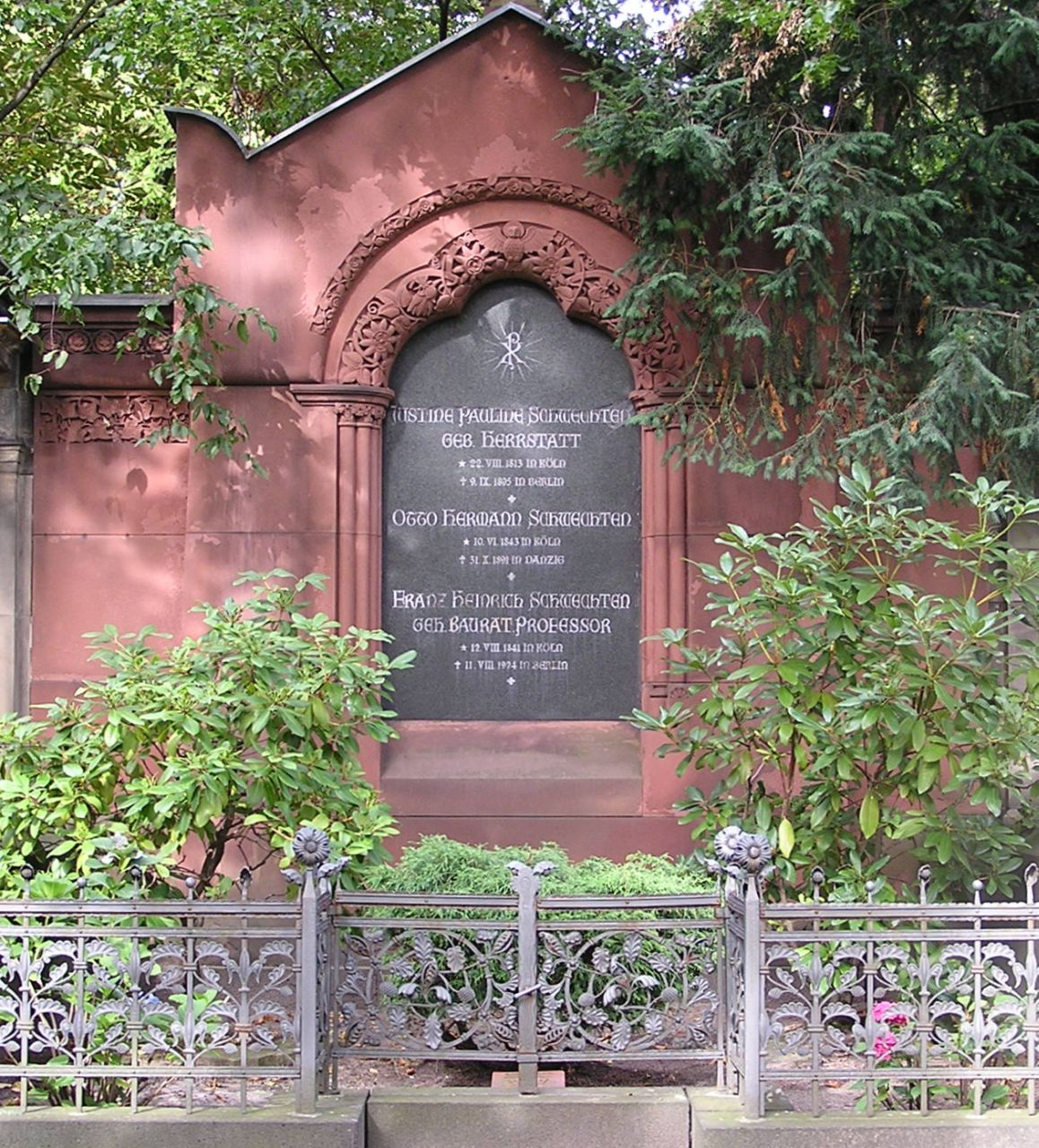 Kirchhof Alt-Schöneberg, Grab Franz Heinrich Schwechten